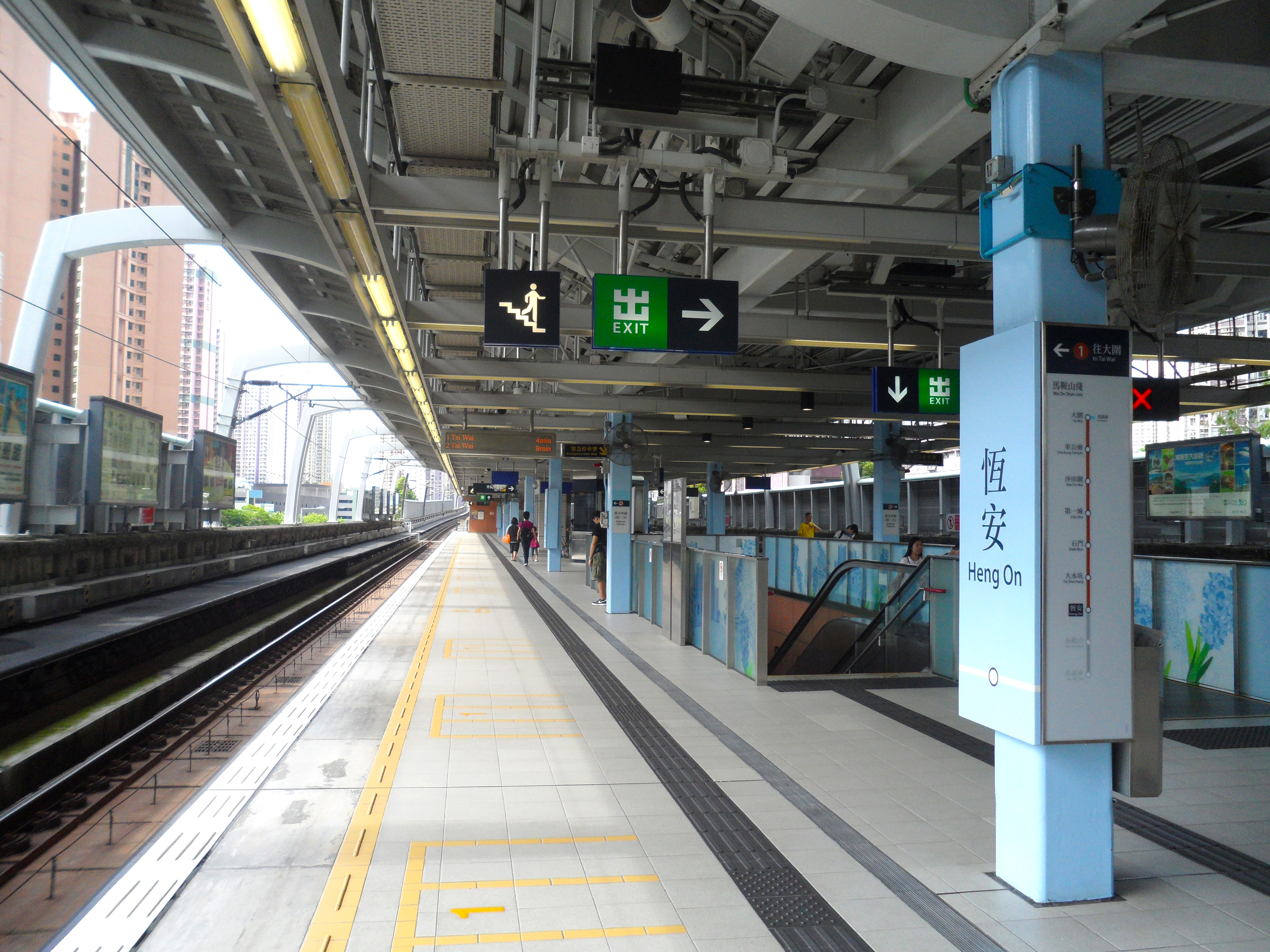 港鐵恆安站一號月台